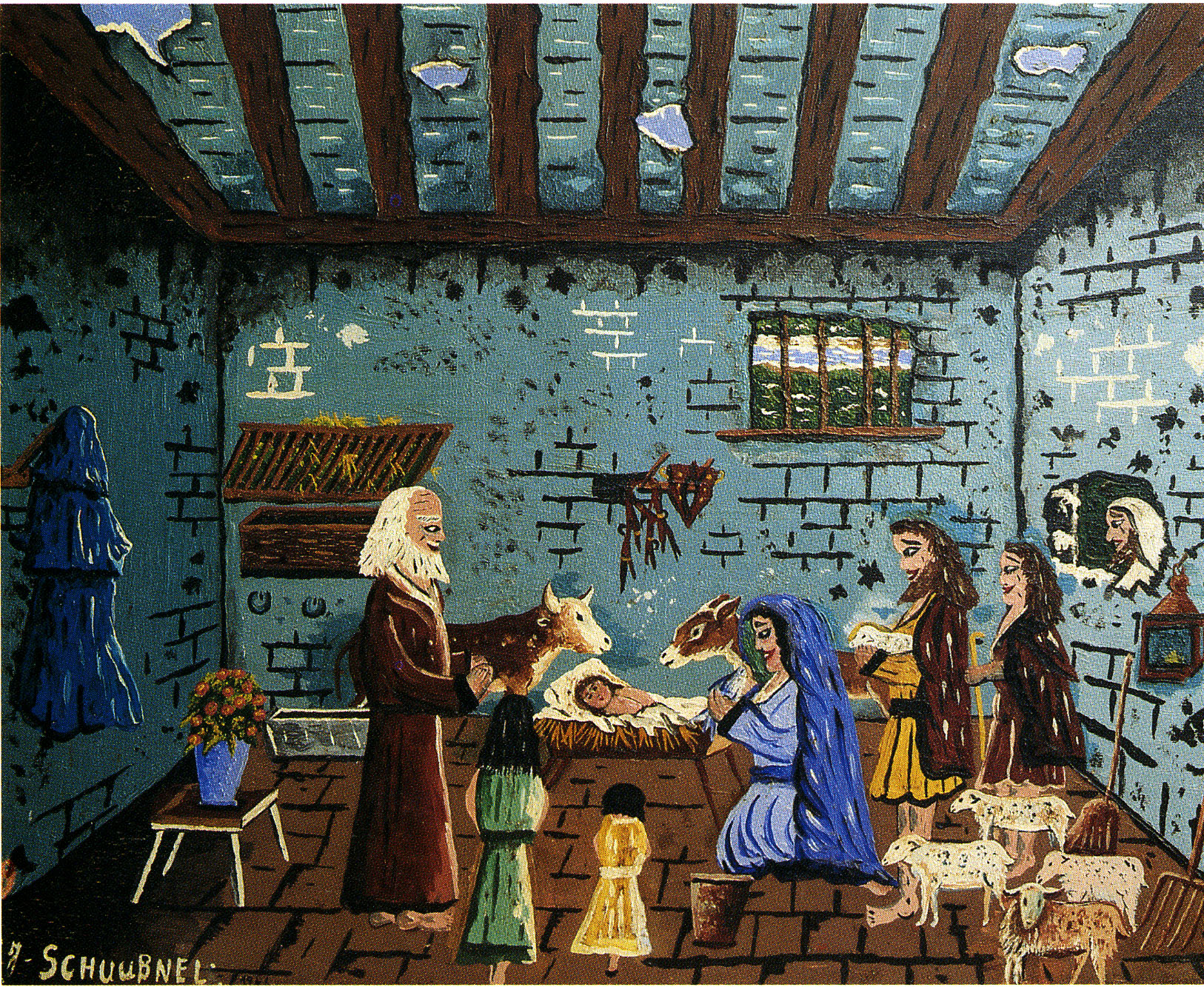 Nativite.jpg